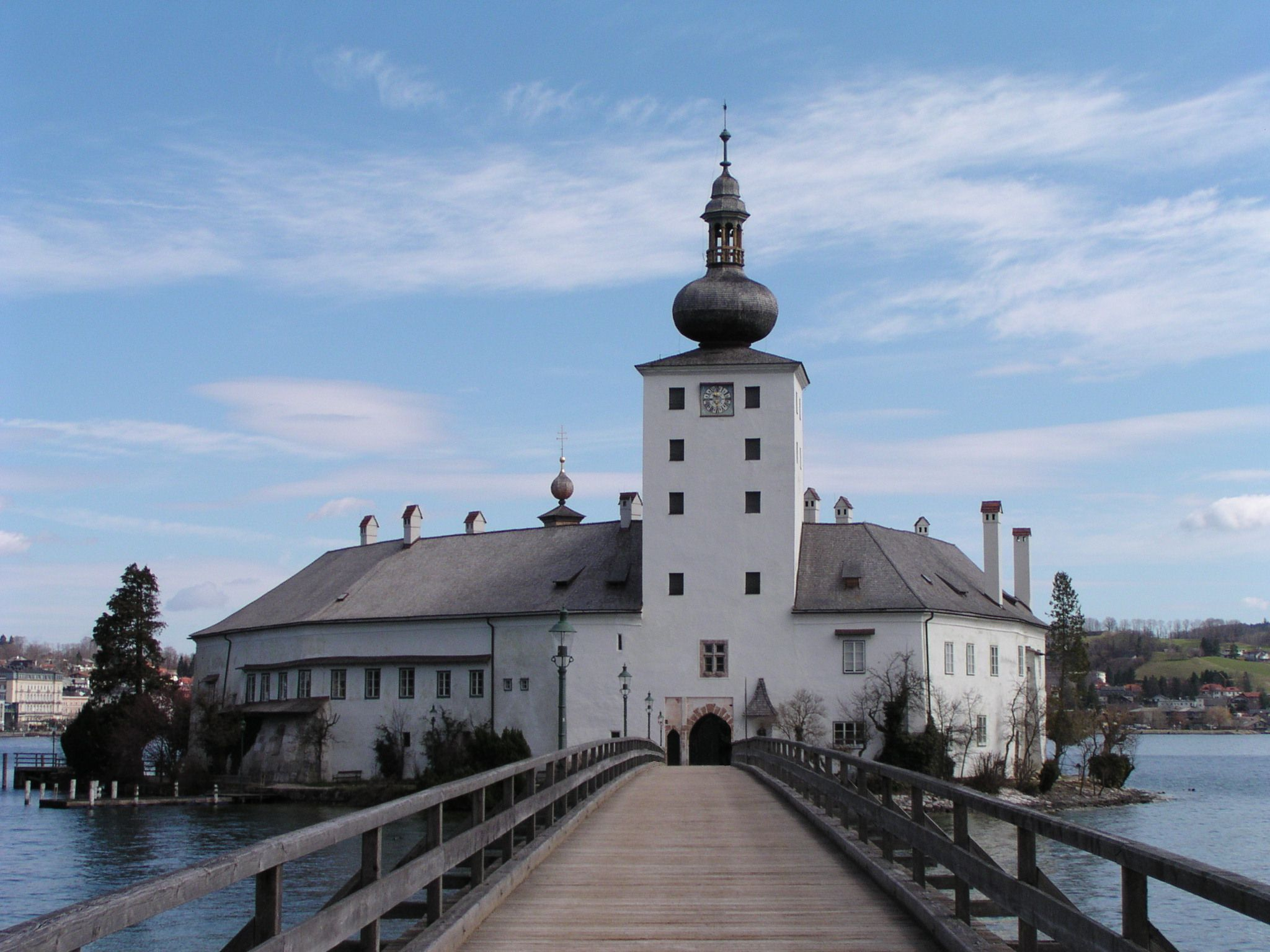 Schloss Ort am Traunsee bei Gmunden, Österreich